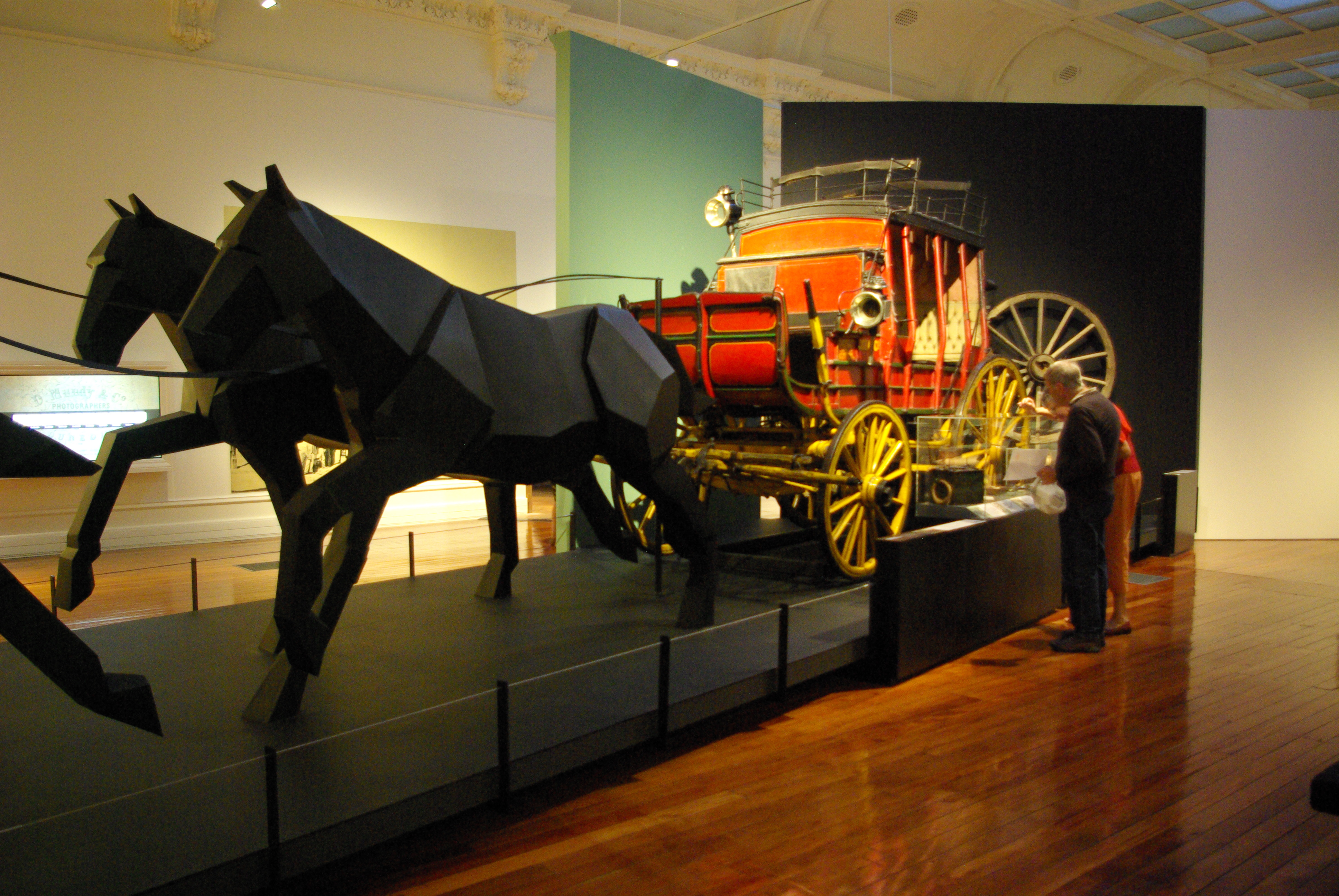 Stagecoach in Dunedin Settlers Museum